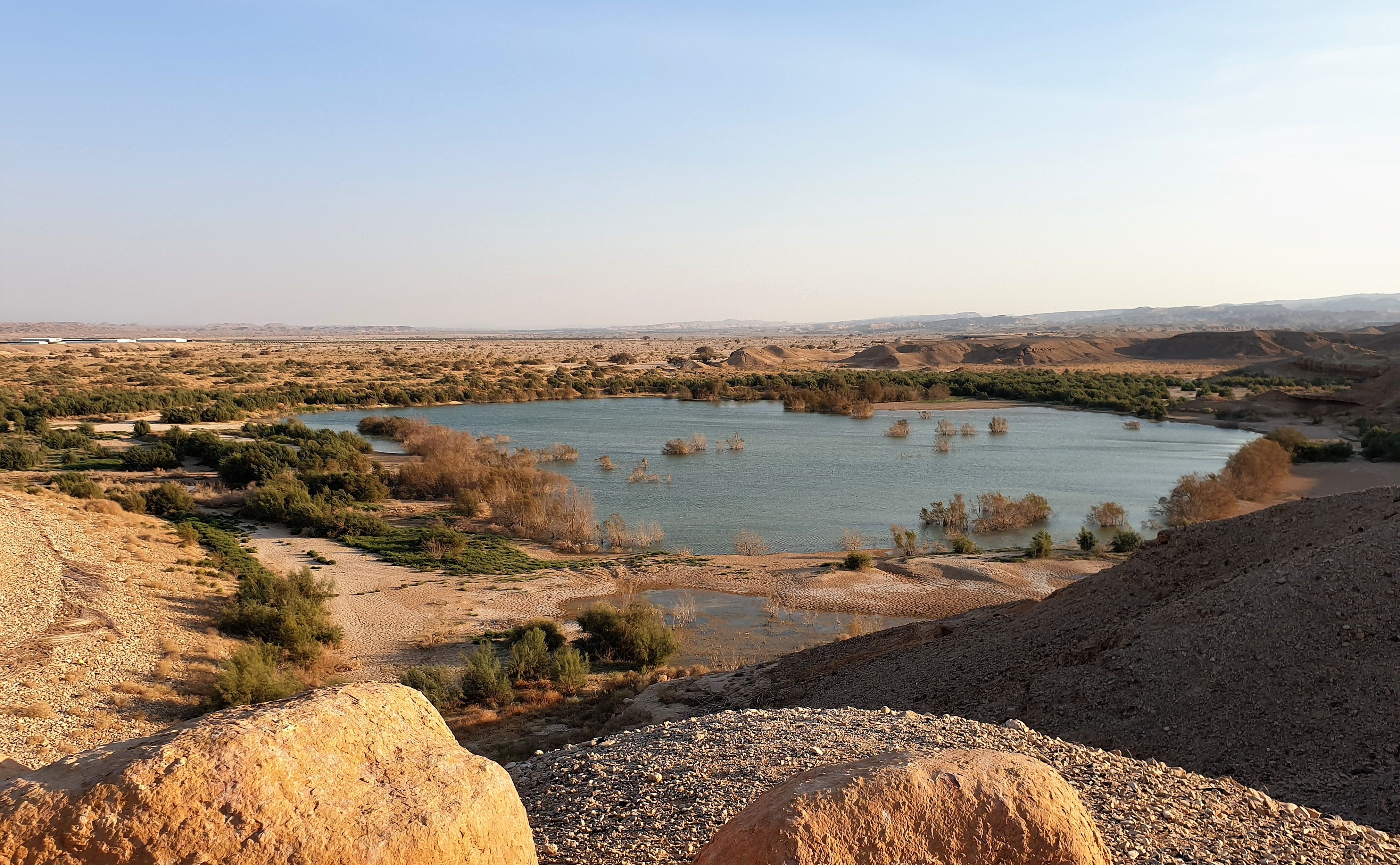 מאגר נקרות, תמונה מגבעת התצפית